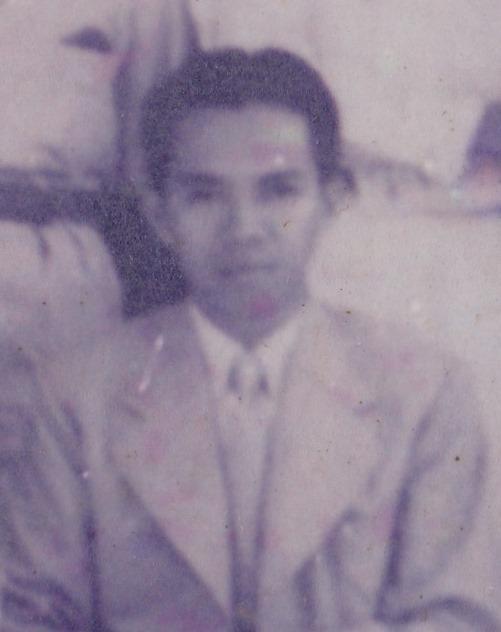 Abdoel Moeis Hassan pada tahun 1949.